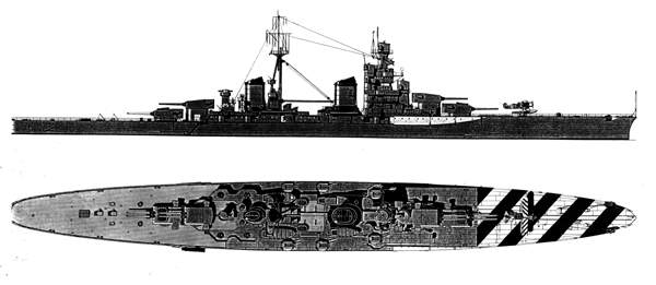 Profilo e pianta dell'incrociatore pesante Zara sul sito della Marina Militare Italiana